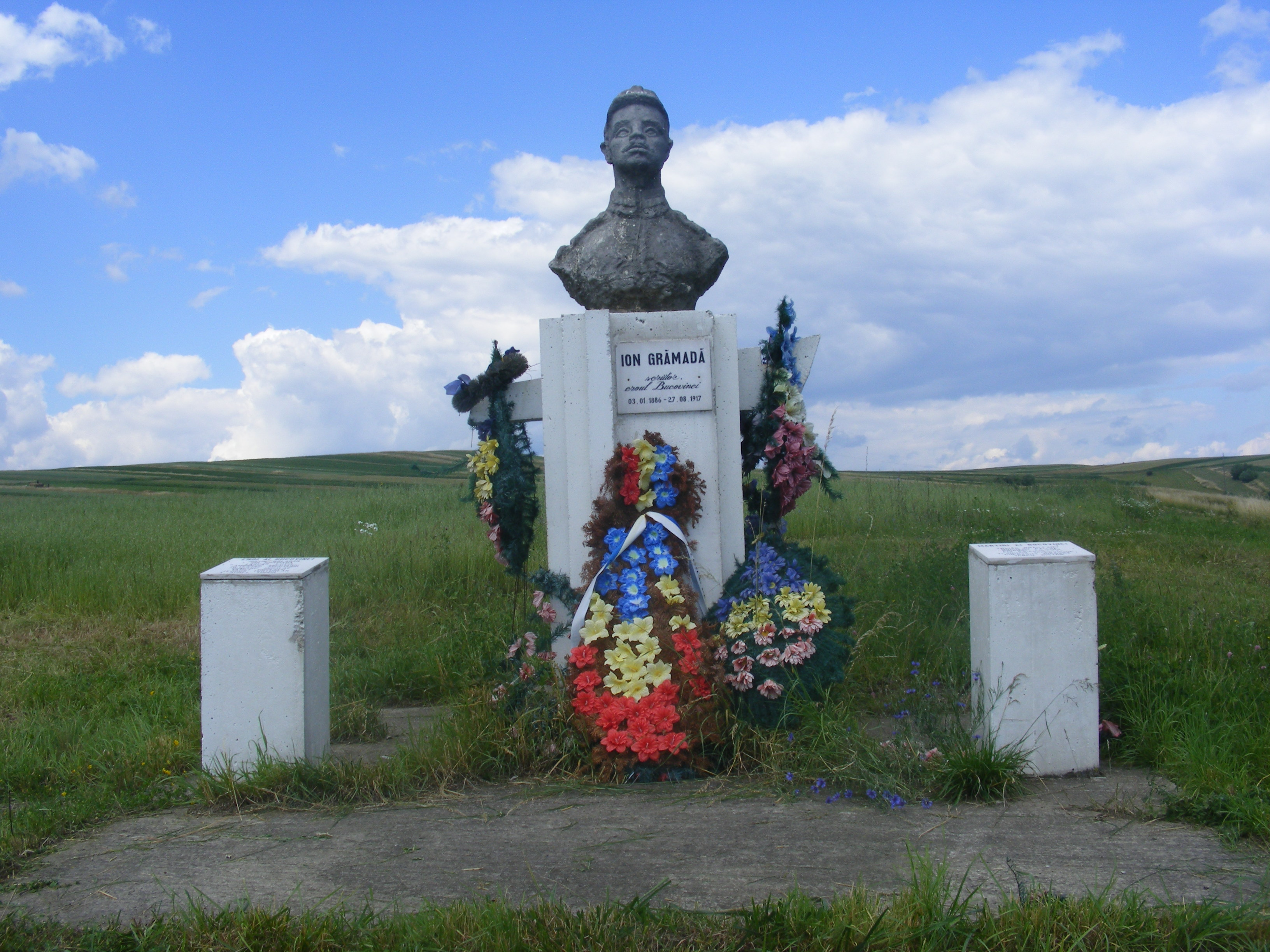 The bust raised on the right side of DN17 (E58) near Stroieşti locality (Suceava County), the hero of Cireşoaia Ion GrămadăRomână: Monumentul a fost inaugurat în anul 2007